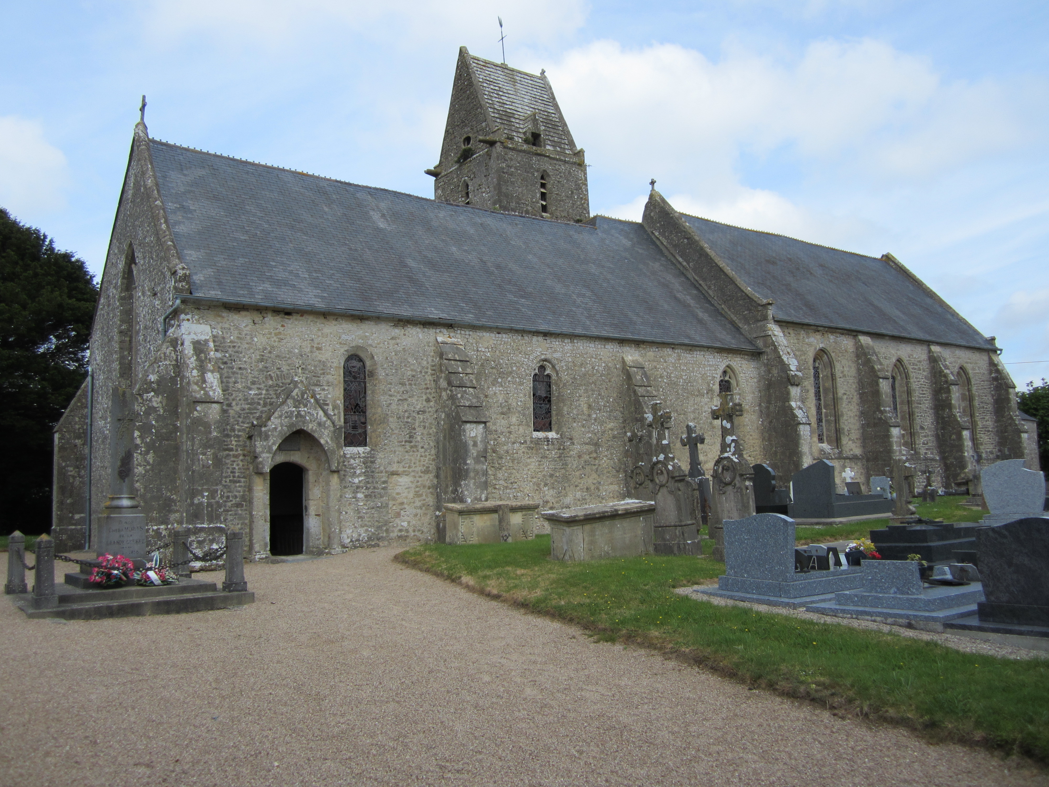 Église Saint-Clément de Flottemanville-Bocage (XIV/XV) .